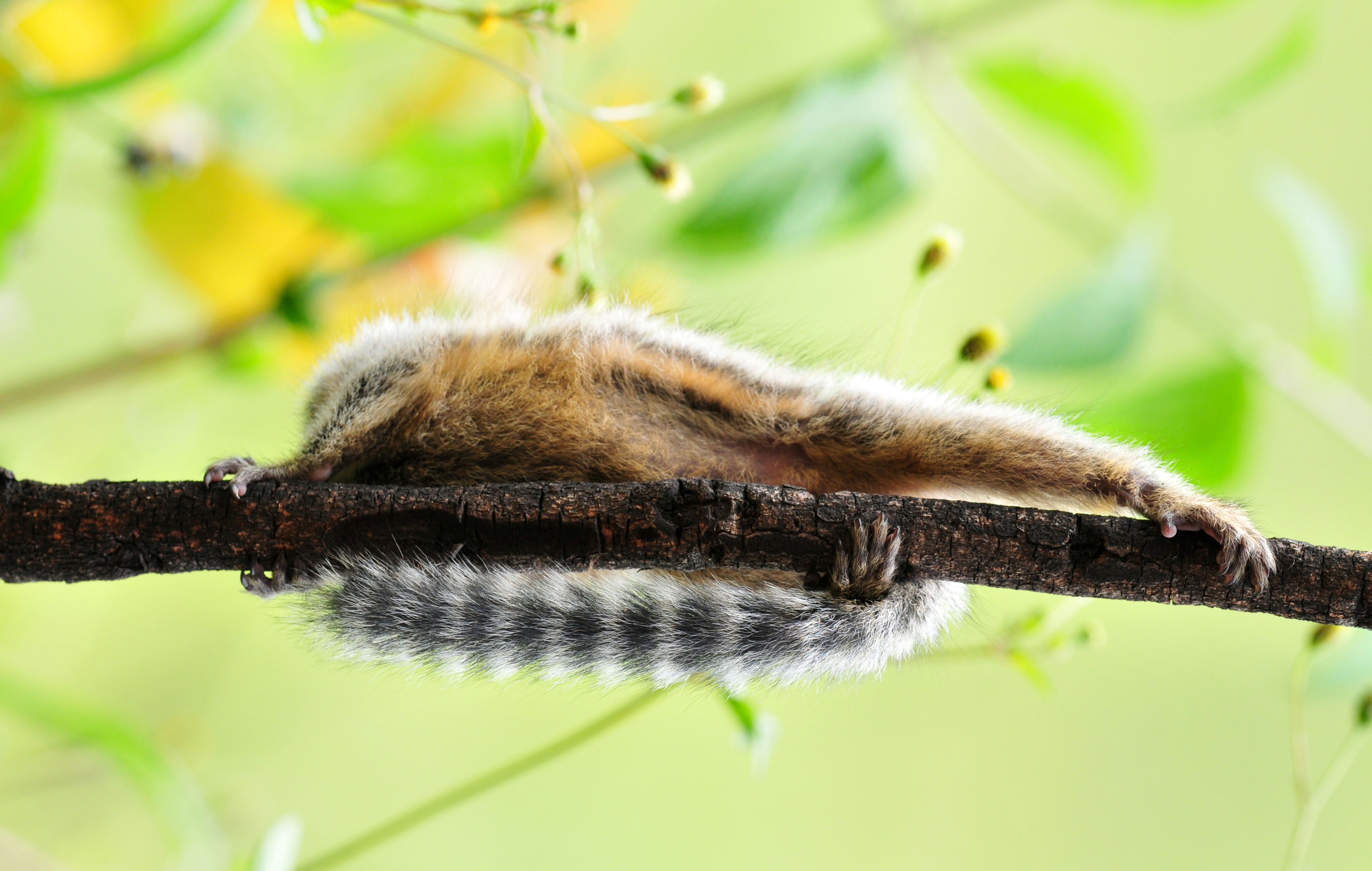 Estação Ecológica de Águas Emendadas, Planaltina, DF, Brasil 25/3/2015 Foto: Tony Winston/Agência Brasília